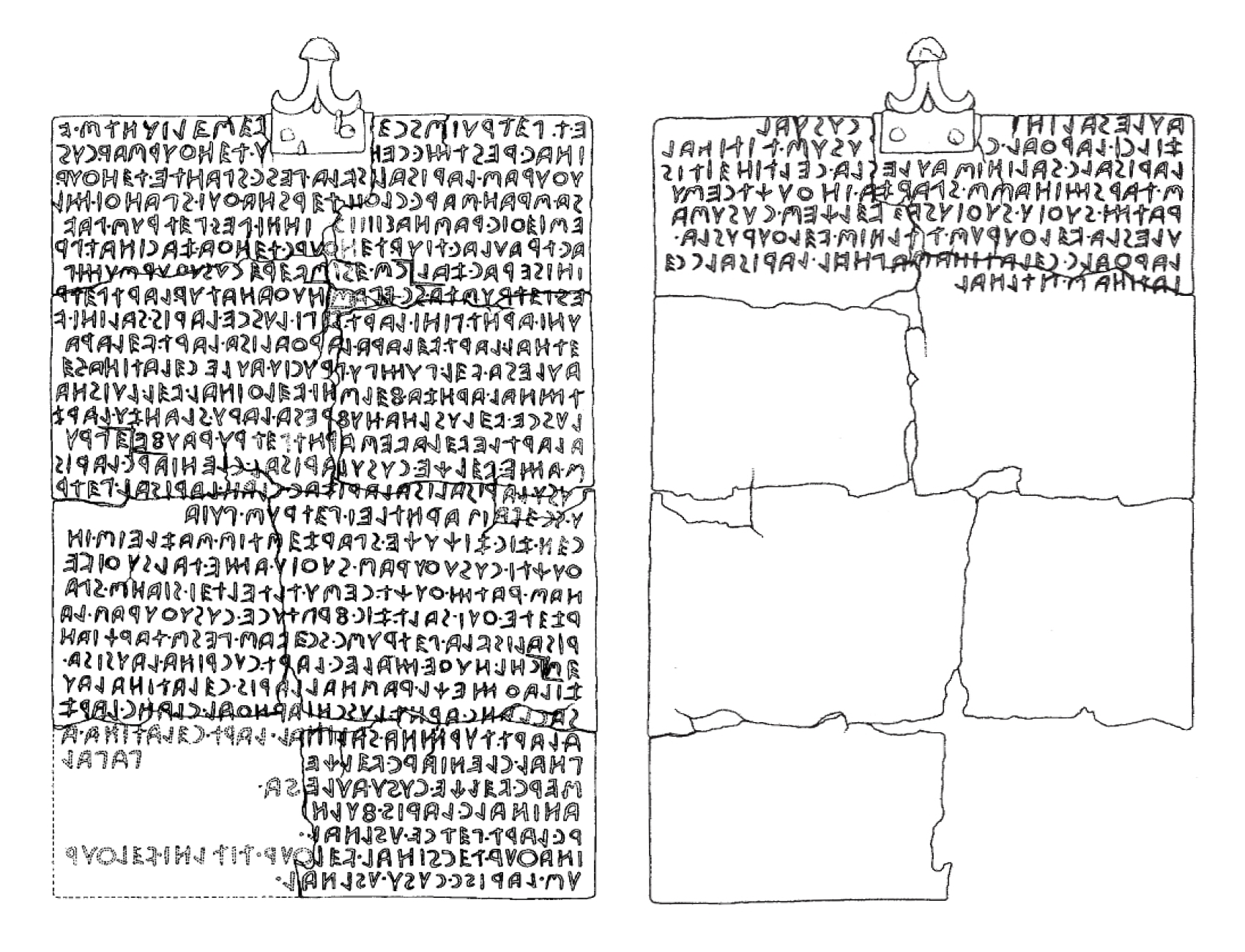 Tabula Cortonensis